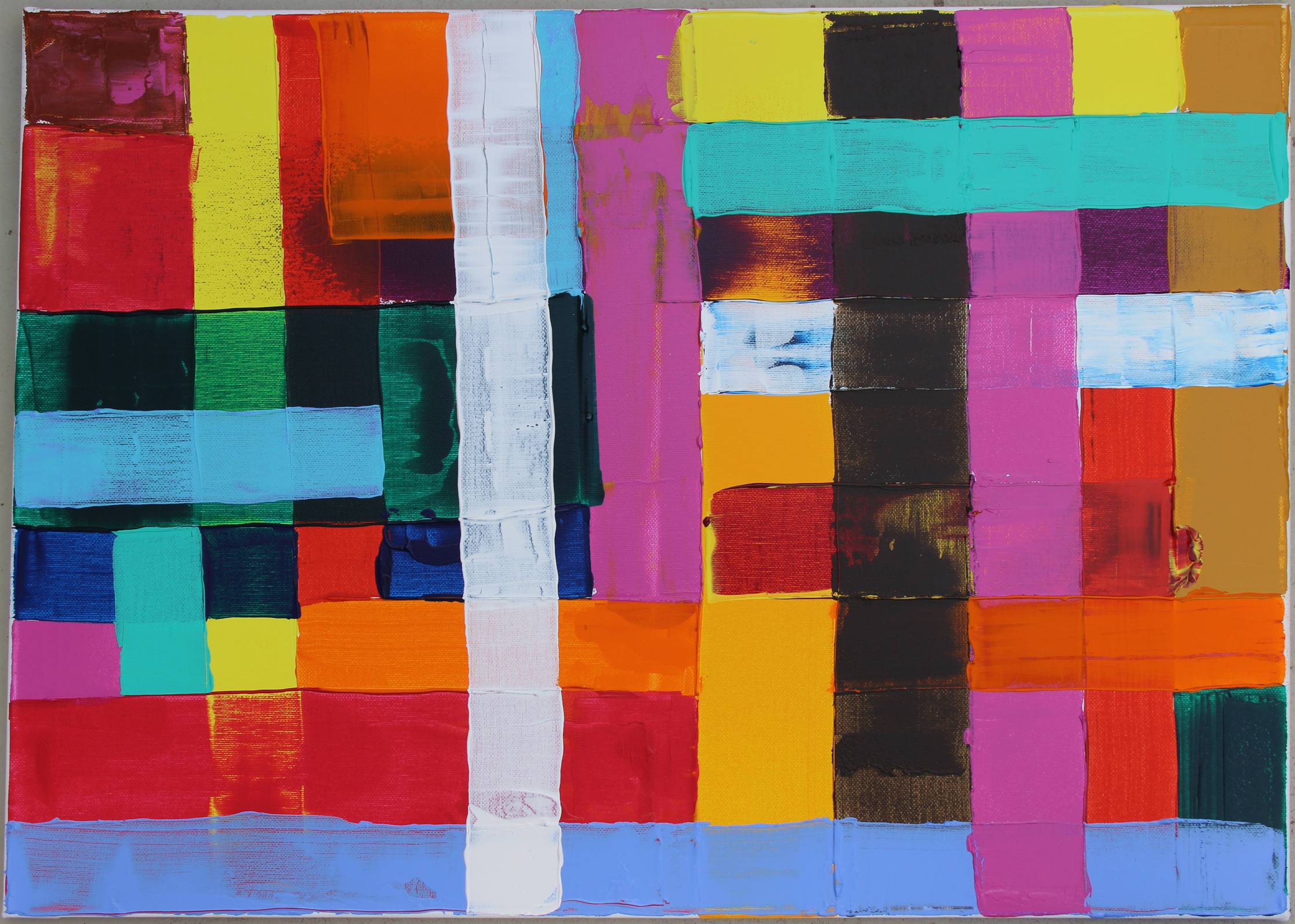 Farbfeld-Malerei (Acryl) / Color Field Painting (Acrylic Color)